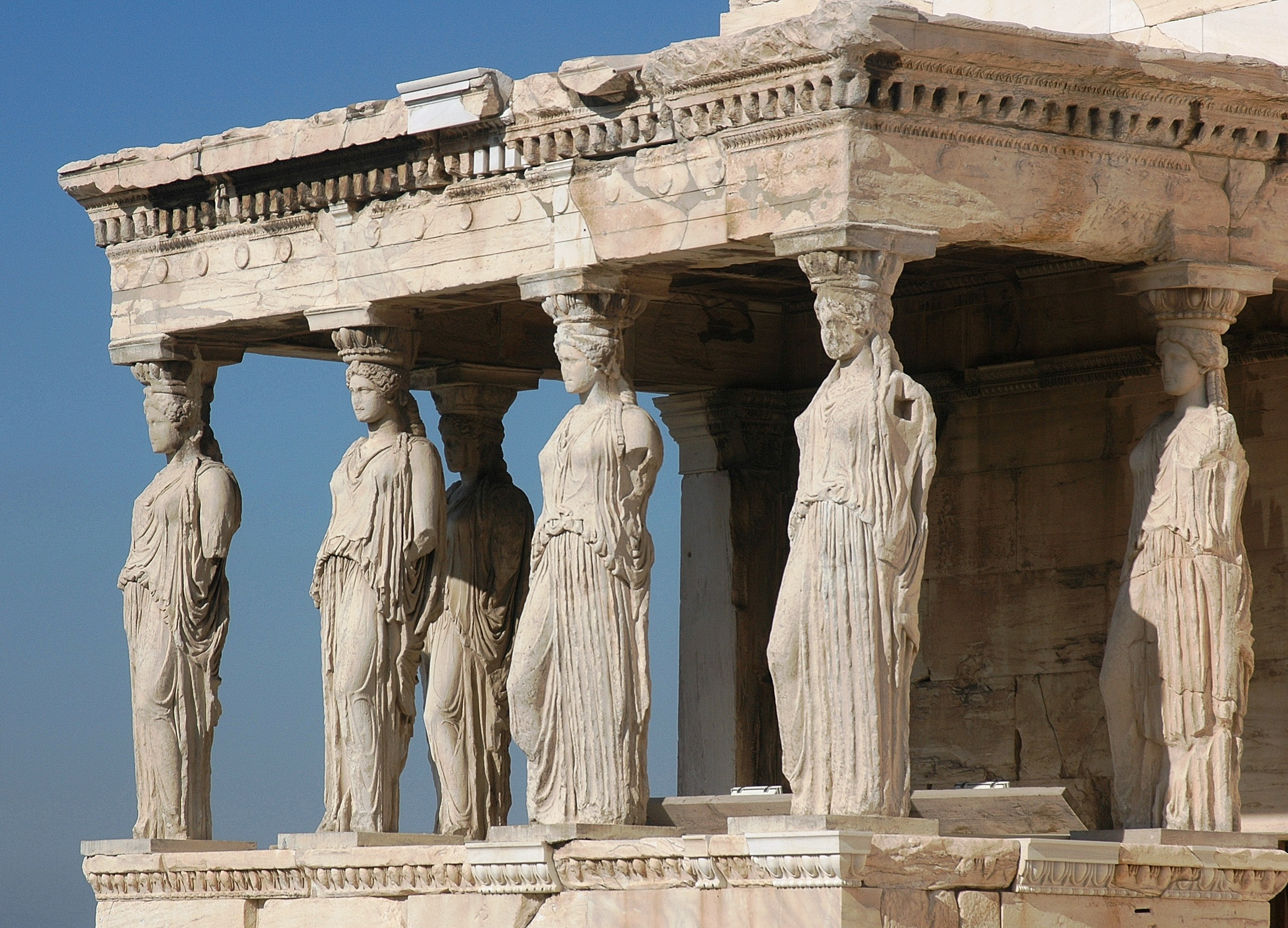 Athènes : les Caryatides sur l'Acropole. Photo prise par Harrieta171 le 21/01/06